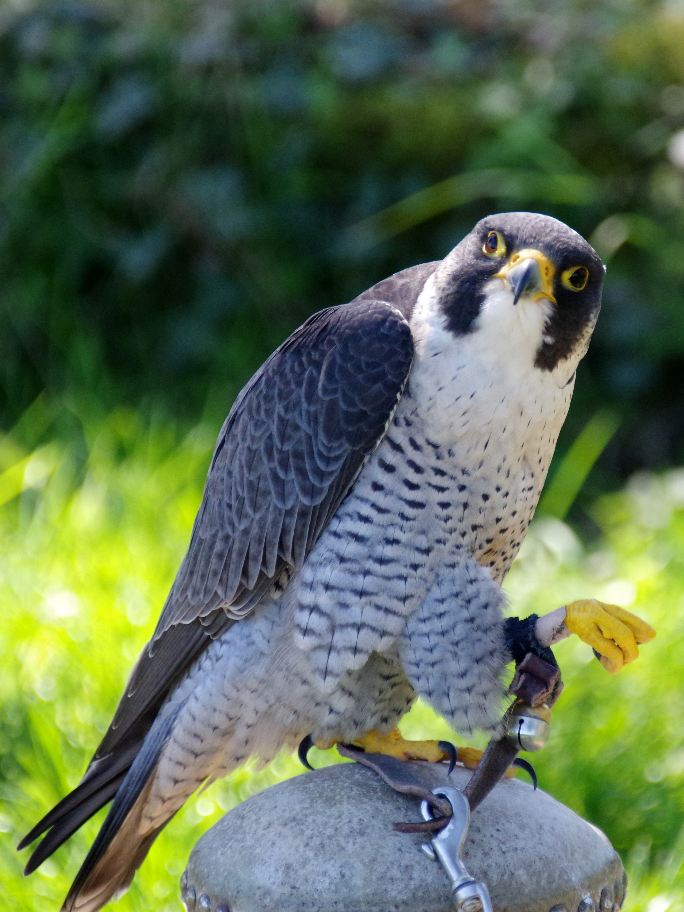 Un Faucon pèlerin au zoo de La Bourbansais.